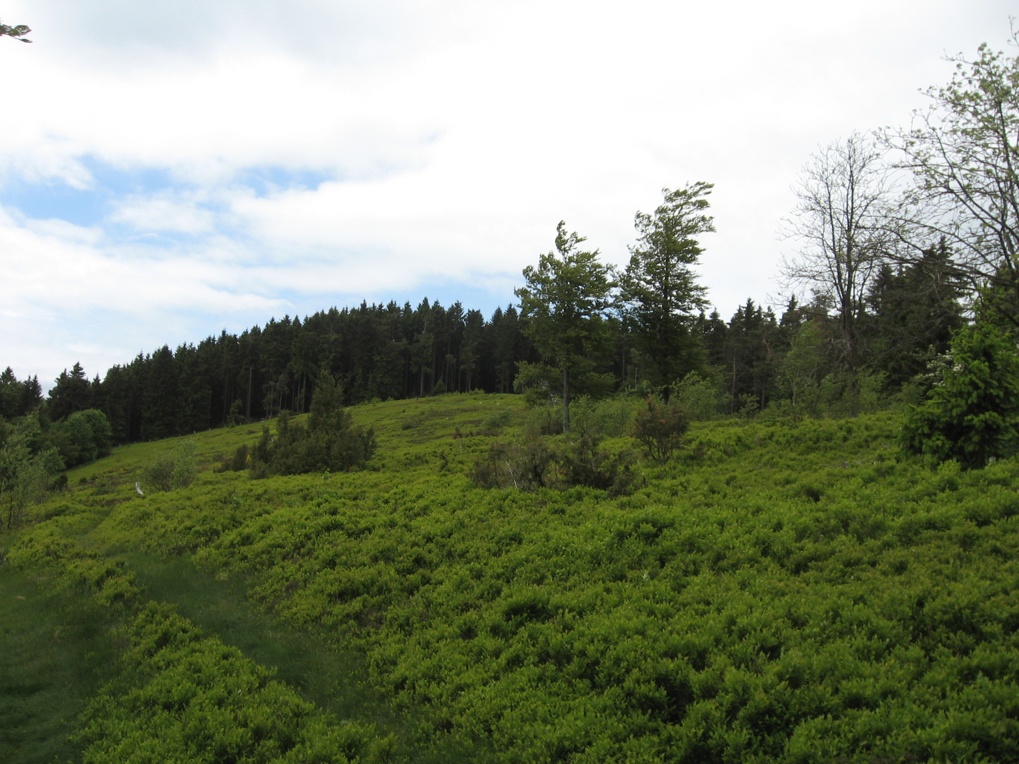 Westliche Bereich vom Naturschutzgebiet Wissinghauser Heide.